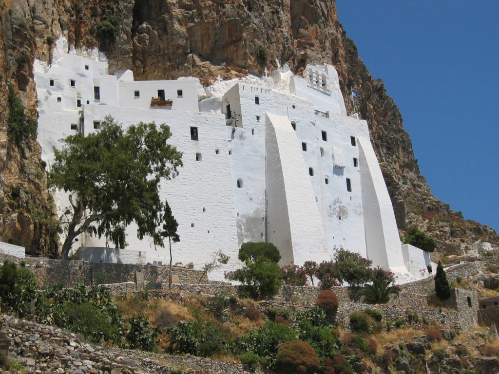 Kloster Chosowiotissa auf Amorgos, Kykladen, Griechenland